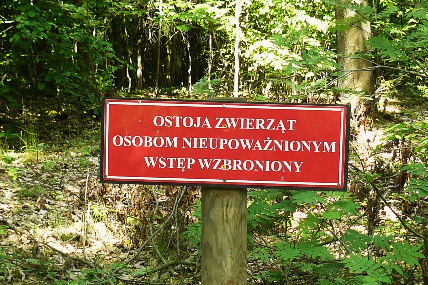 Ostoja zwierząt w Lesie Bytyńskim.